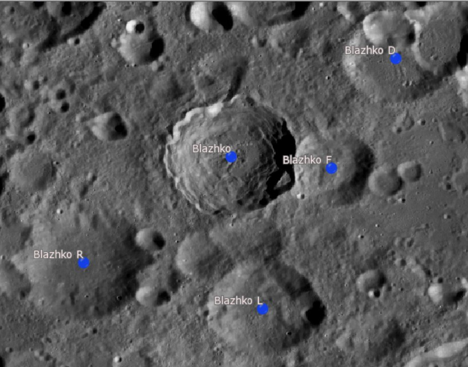 Cráter lunar Blazhko. Cráteres satélite. (Imagen LRO)